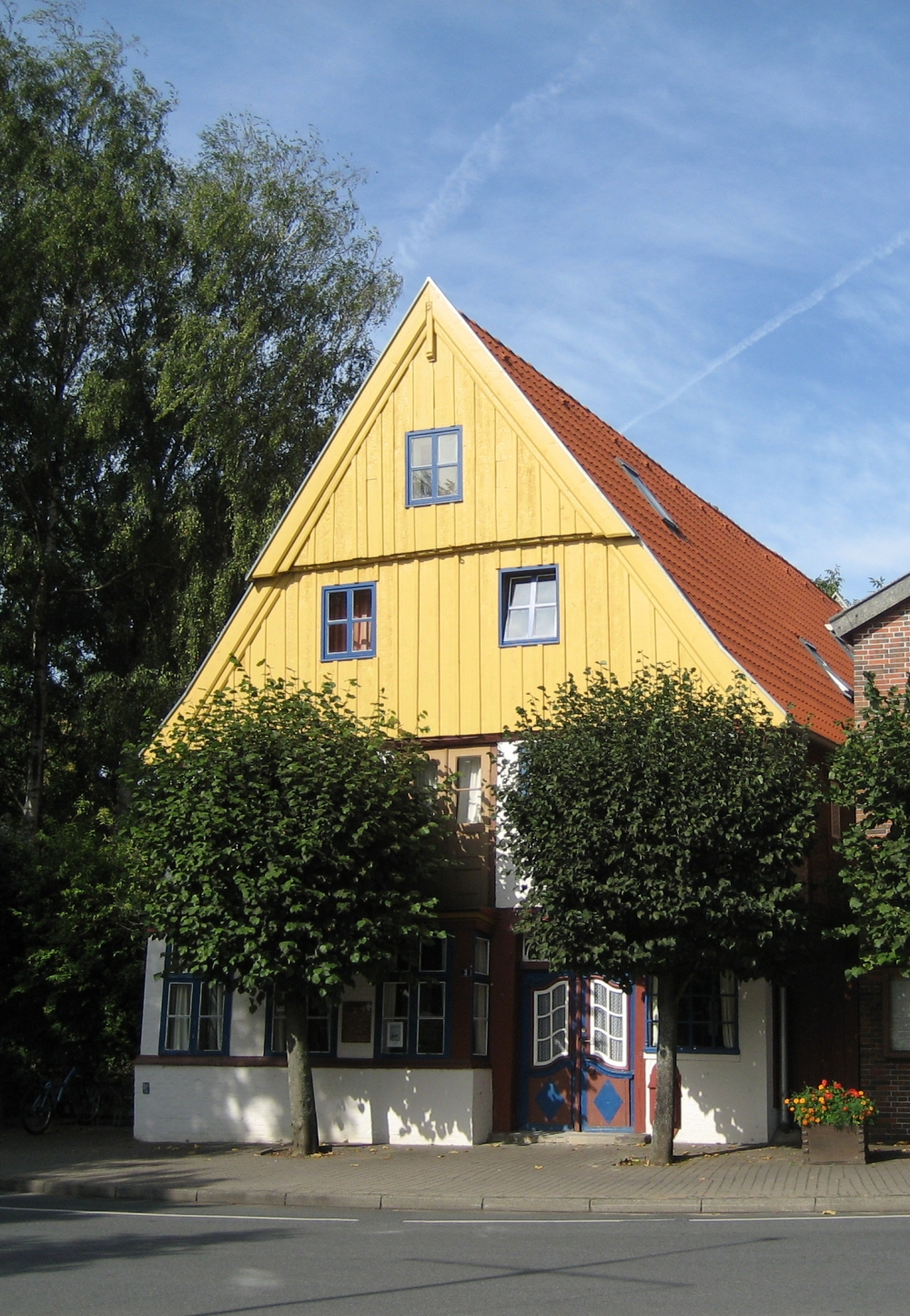 Frontansicht des Fachwerkhauses von 1698, das Günter Grass 1985 der Berliner Akademie der Künste als Stipendiatenhaus überlassen hat.